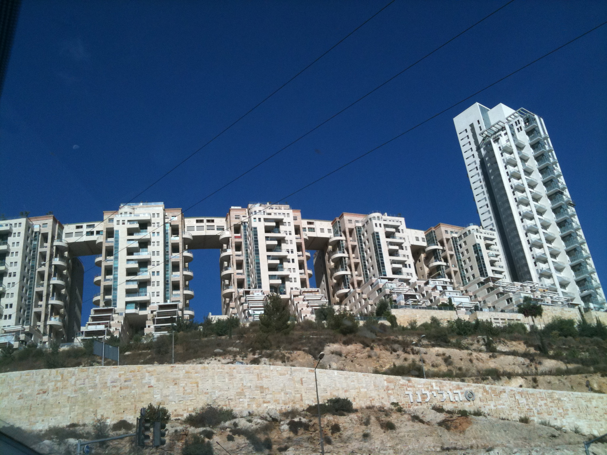 Holyland Towers מגדלי הולינלד